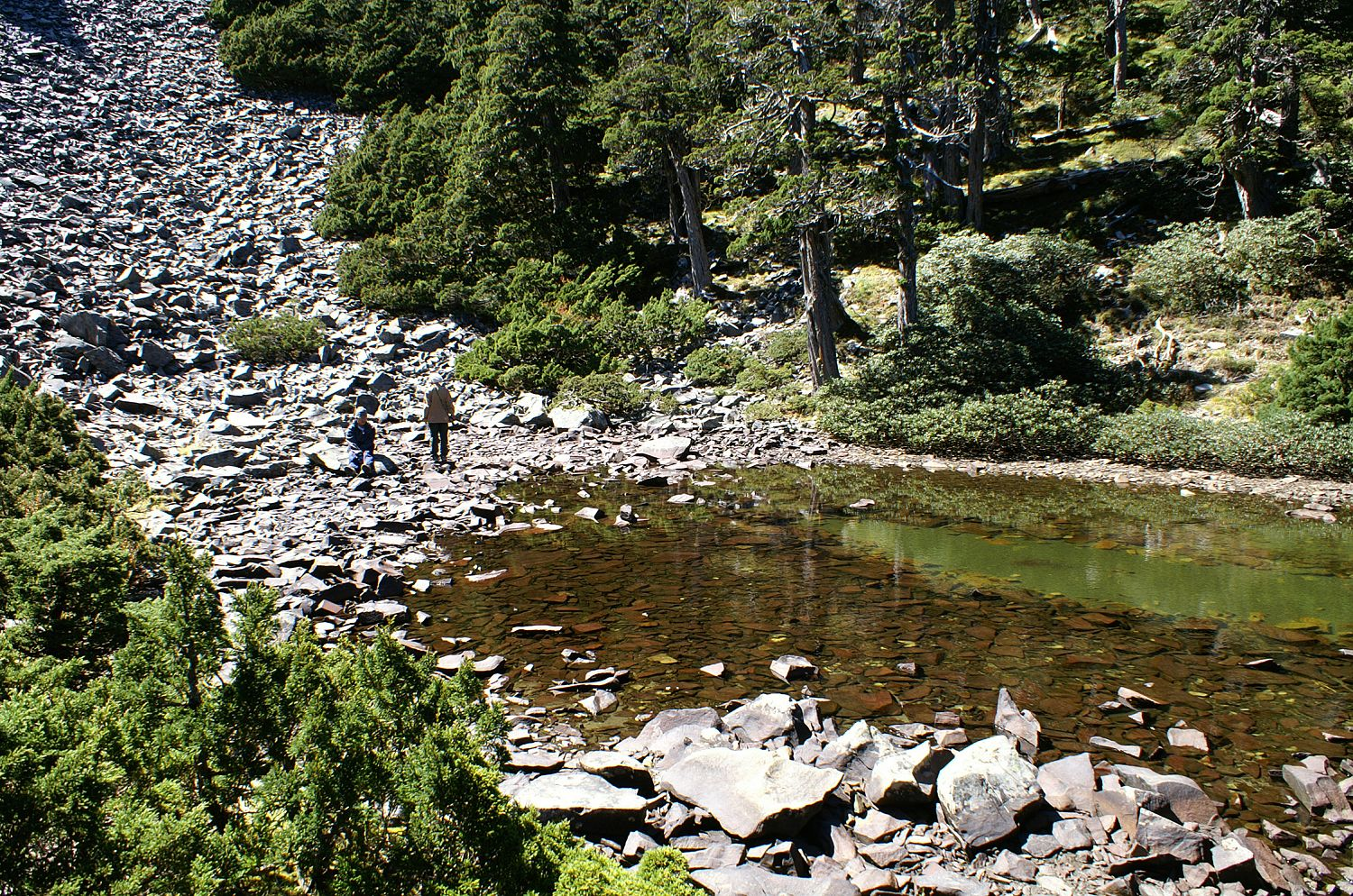 雪山翠池 CueiChih (The Green Jade Pond)